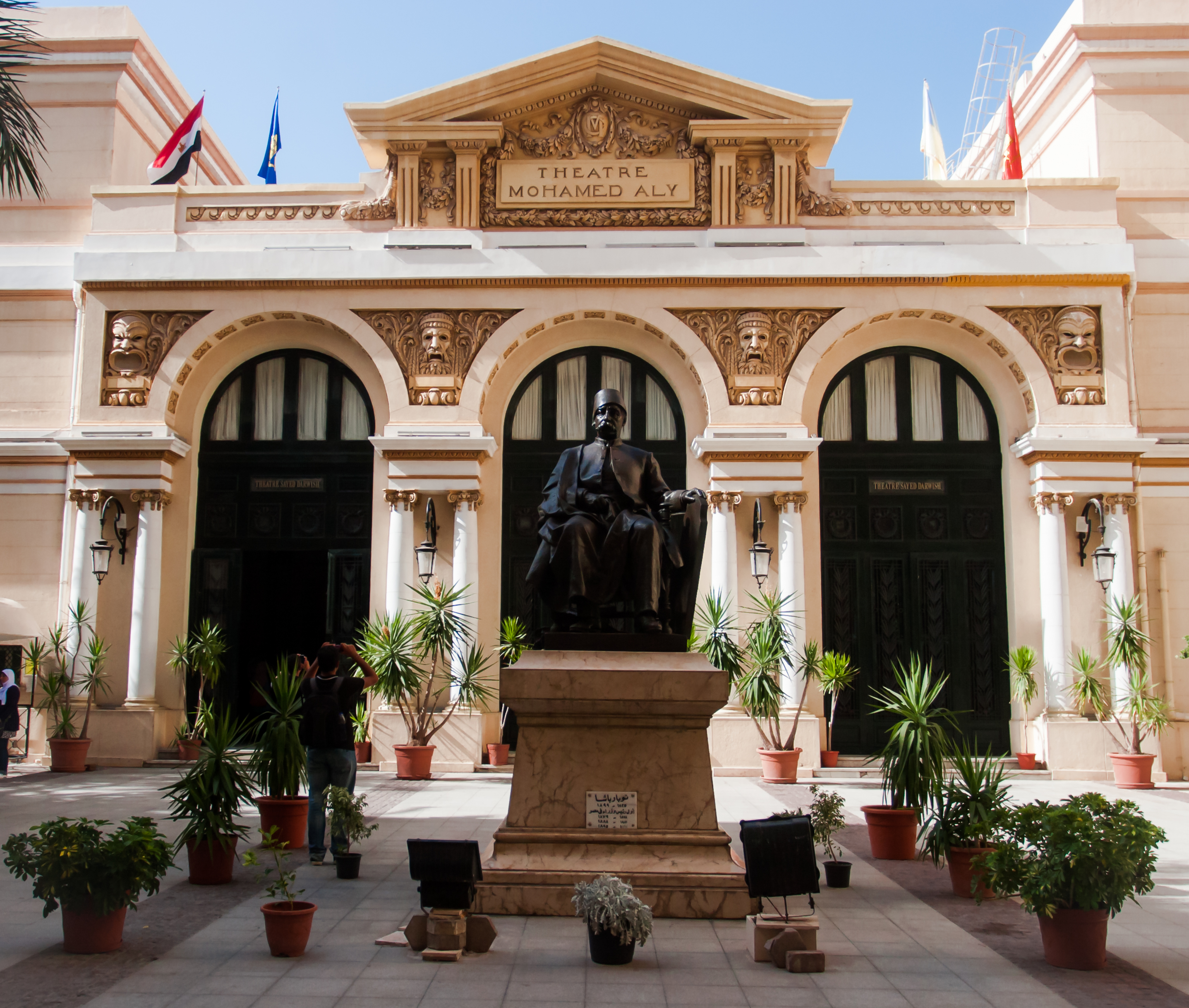 واجهه مسرح سيد درويش بالأسكندرية و بالأمام يتوسط الصورة تمثال نوبار باشا